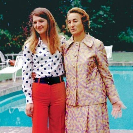 Elena Ceausescu si Zoia Ceausescu.